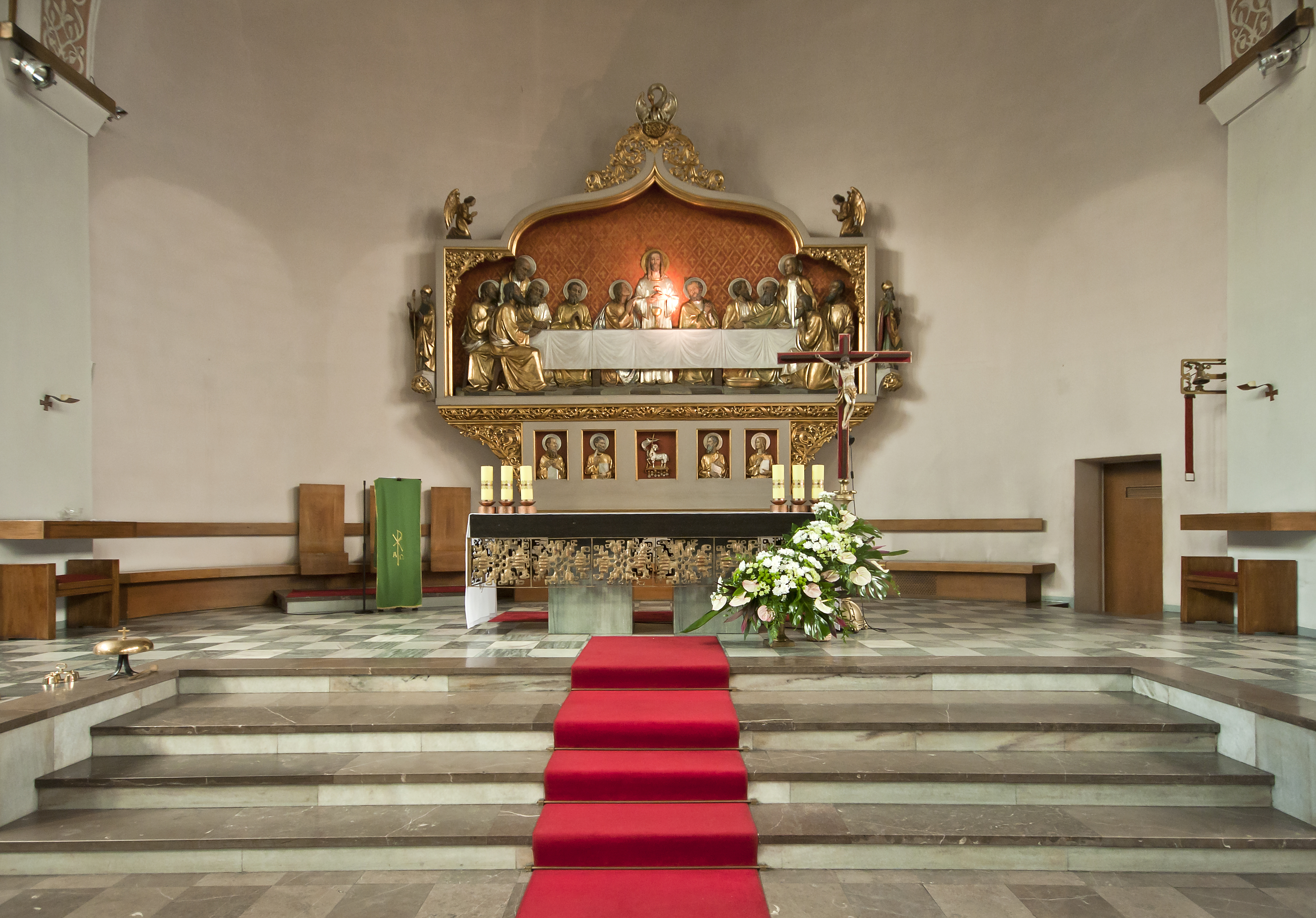 Jesu heliga hjärtas kyrka i Szczecin i Polen.